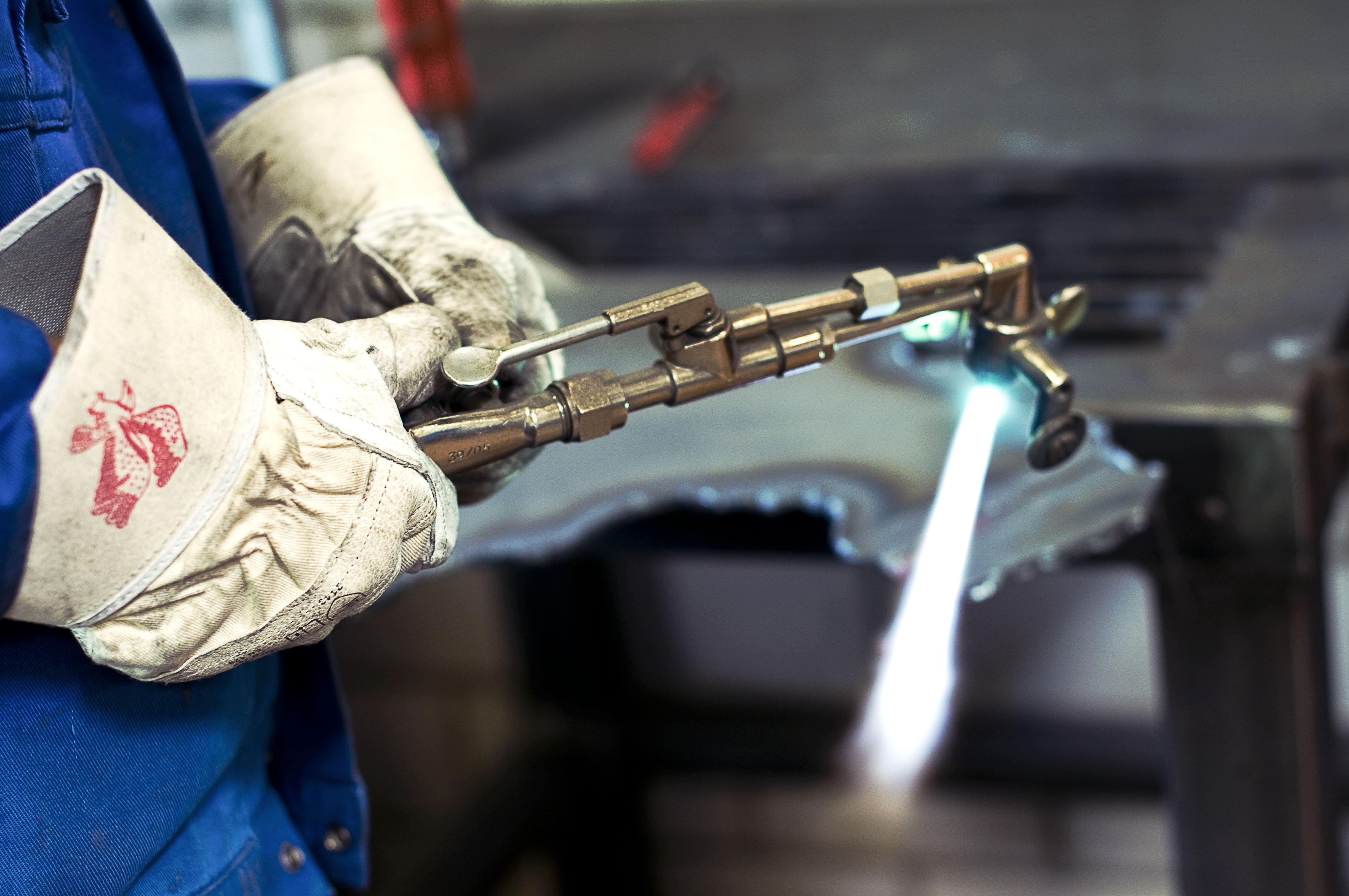 Oxy-fuel cutting